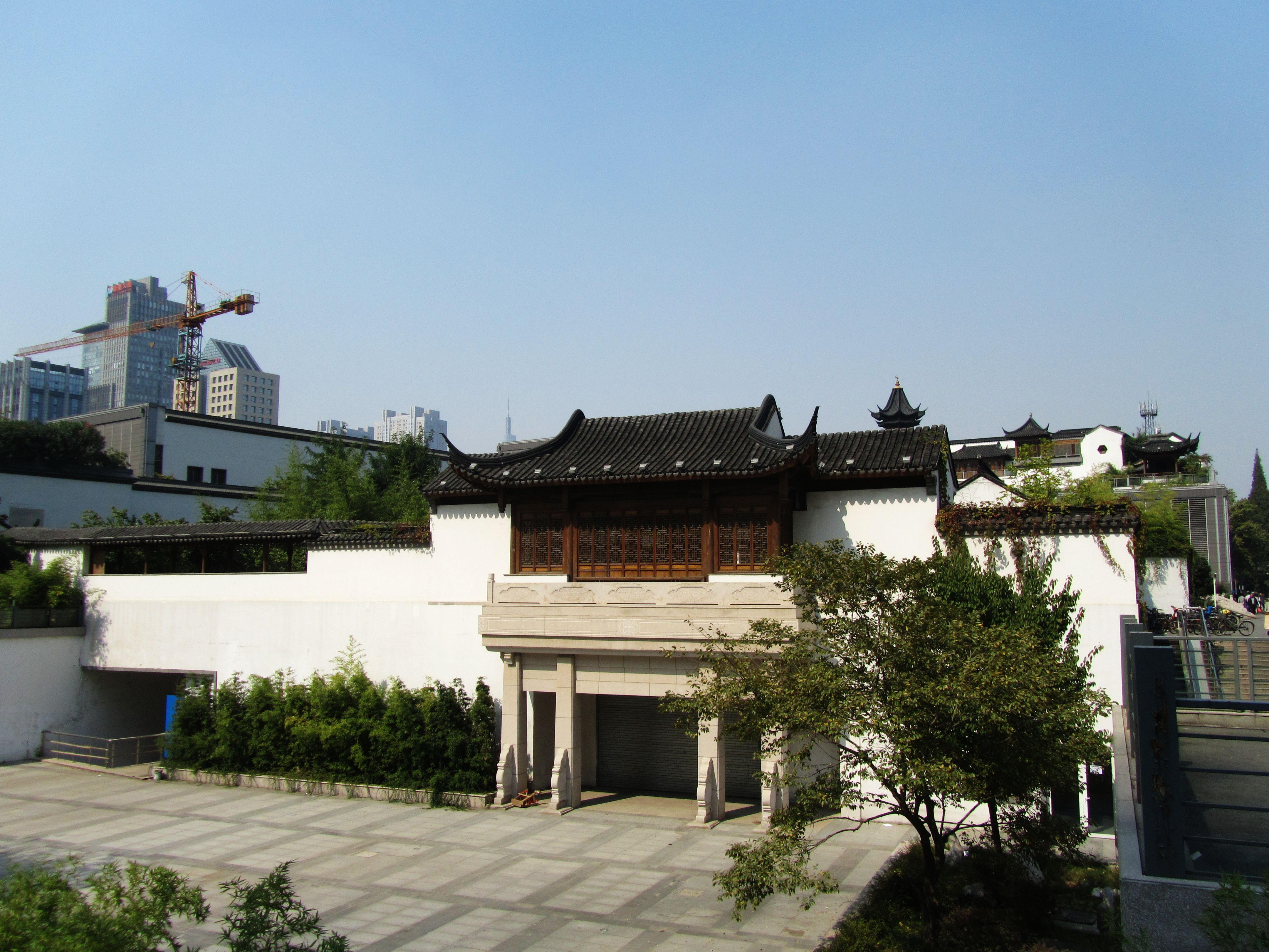 南京复建后的江宁织造府，自大行宫地铁口看。